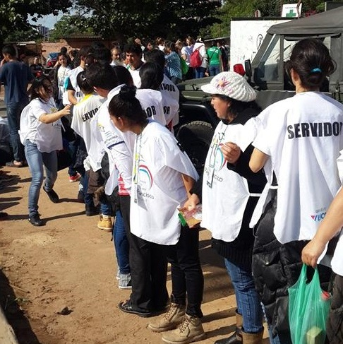 Grupo de servidores realizando un cordón durante uno de los actos en que participara el Papa Francisco en Paraguay. Trabajaron en diferentes lugares unos 80.000 servidores en el trascurso de los tres días que duró la visita.